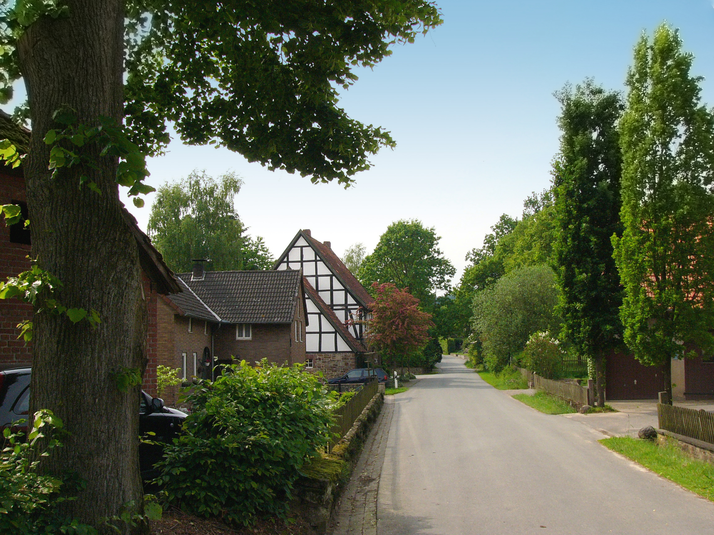 Dorfstraße in Altendonop, Ortsteil von Blomberg, Germany